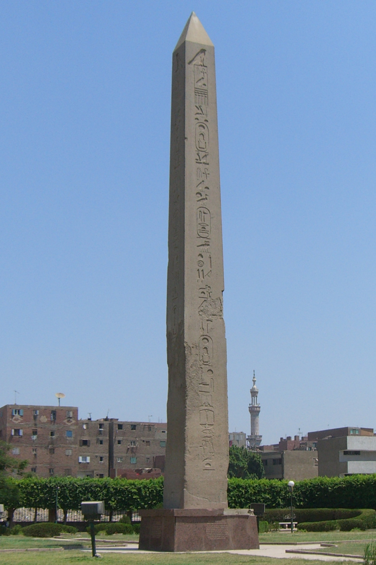 Obélisque de Sésostris Ier - XIIe dynastie - Moyen Empire